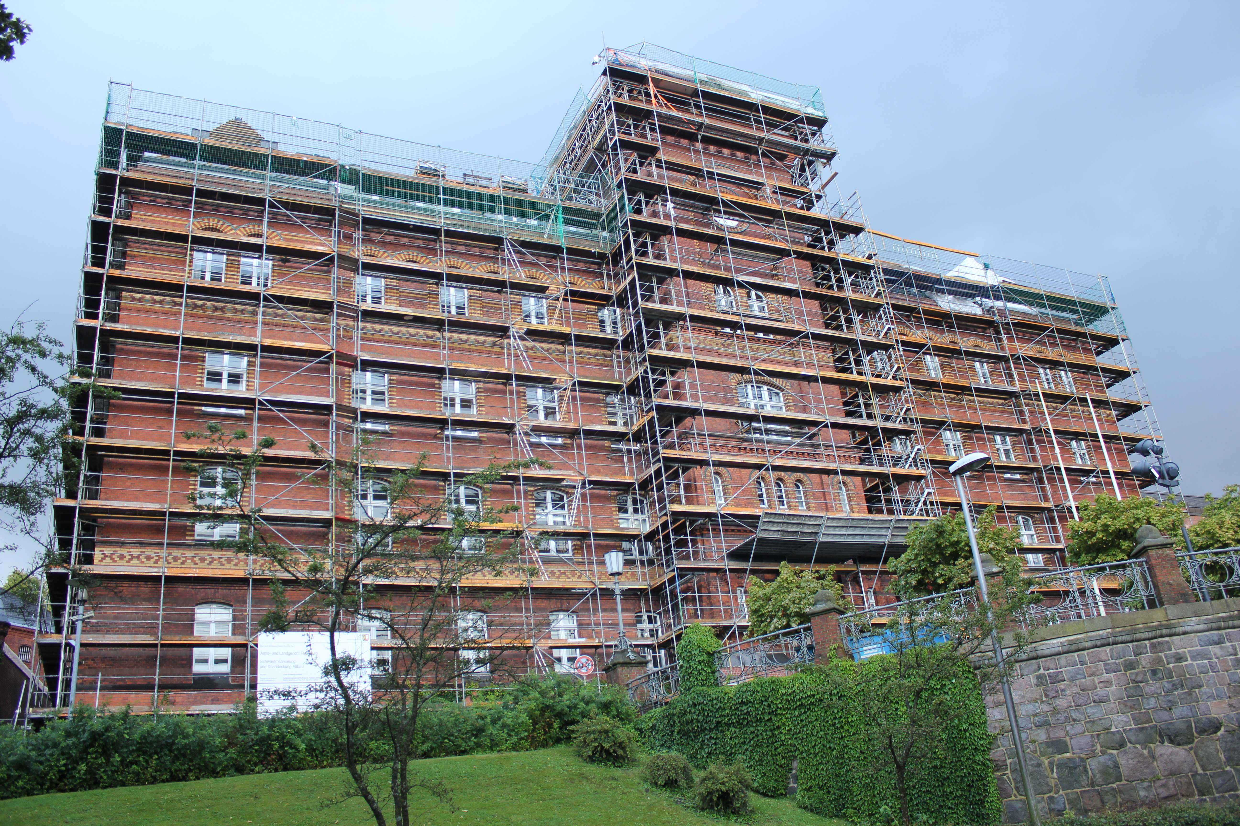 Landgericht, Restaurierung (Flensburg, 22 August 2014), Bild 02